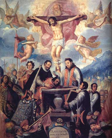 Bautizo de los Señores de Tlaxcala.